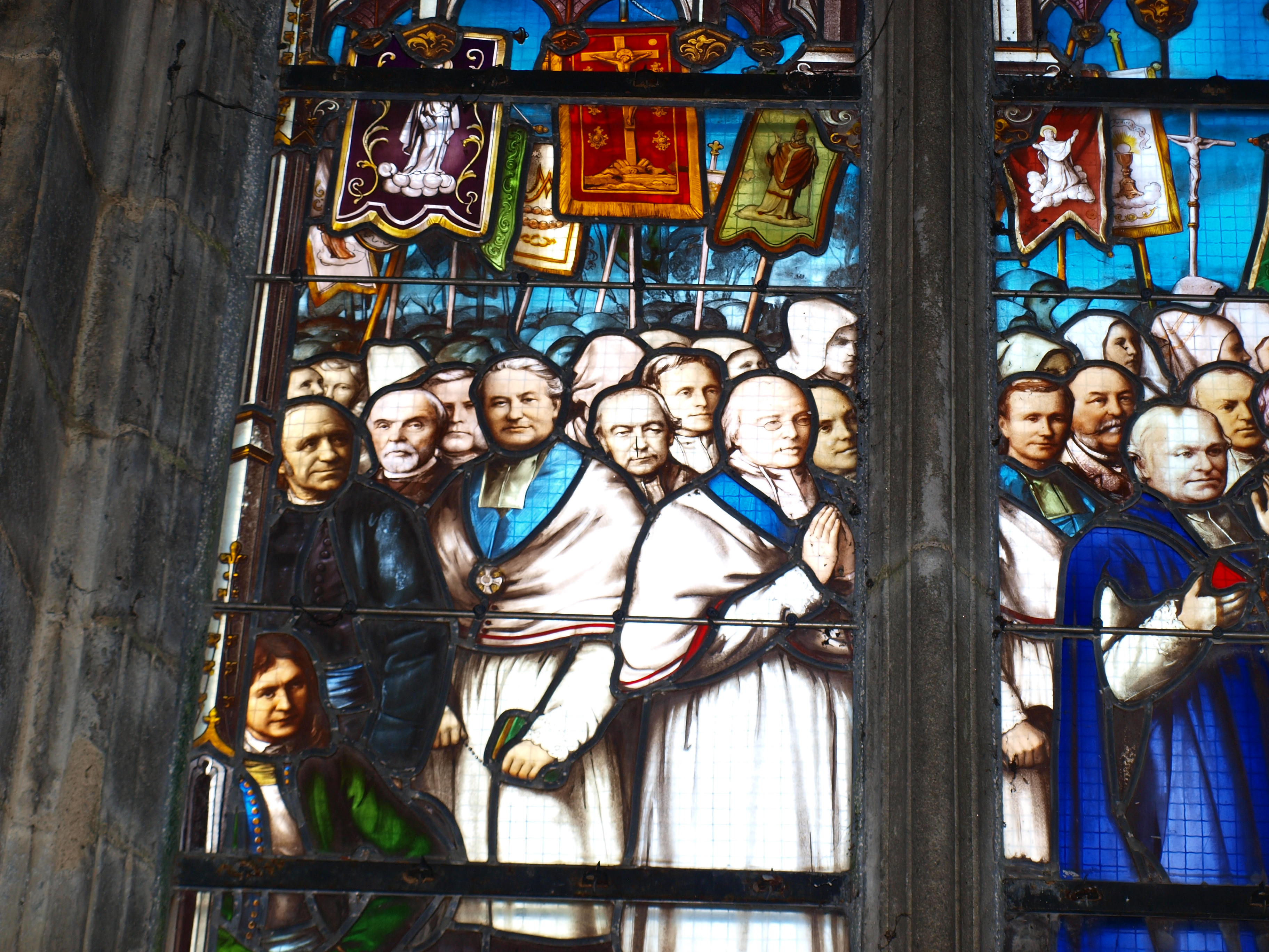 Détail du vitrail du transept de la basilique Notre-Dame du Folgoët